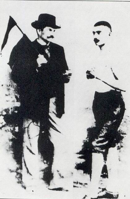 освајач олимпијске медаље у Берлину 1901